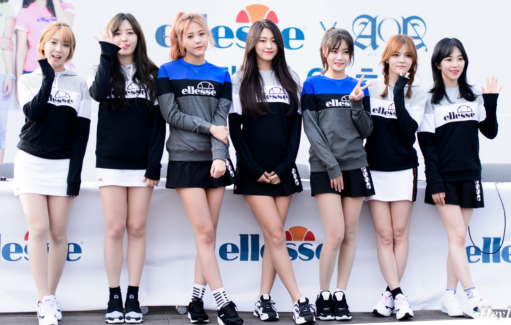 AOA bei der Autogrammstunde der Sportmarke Ellesse am 8. April 2016 in Seoul.